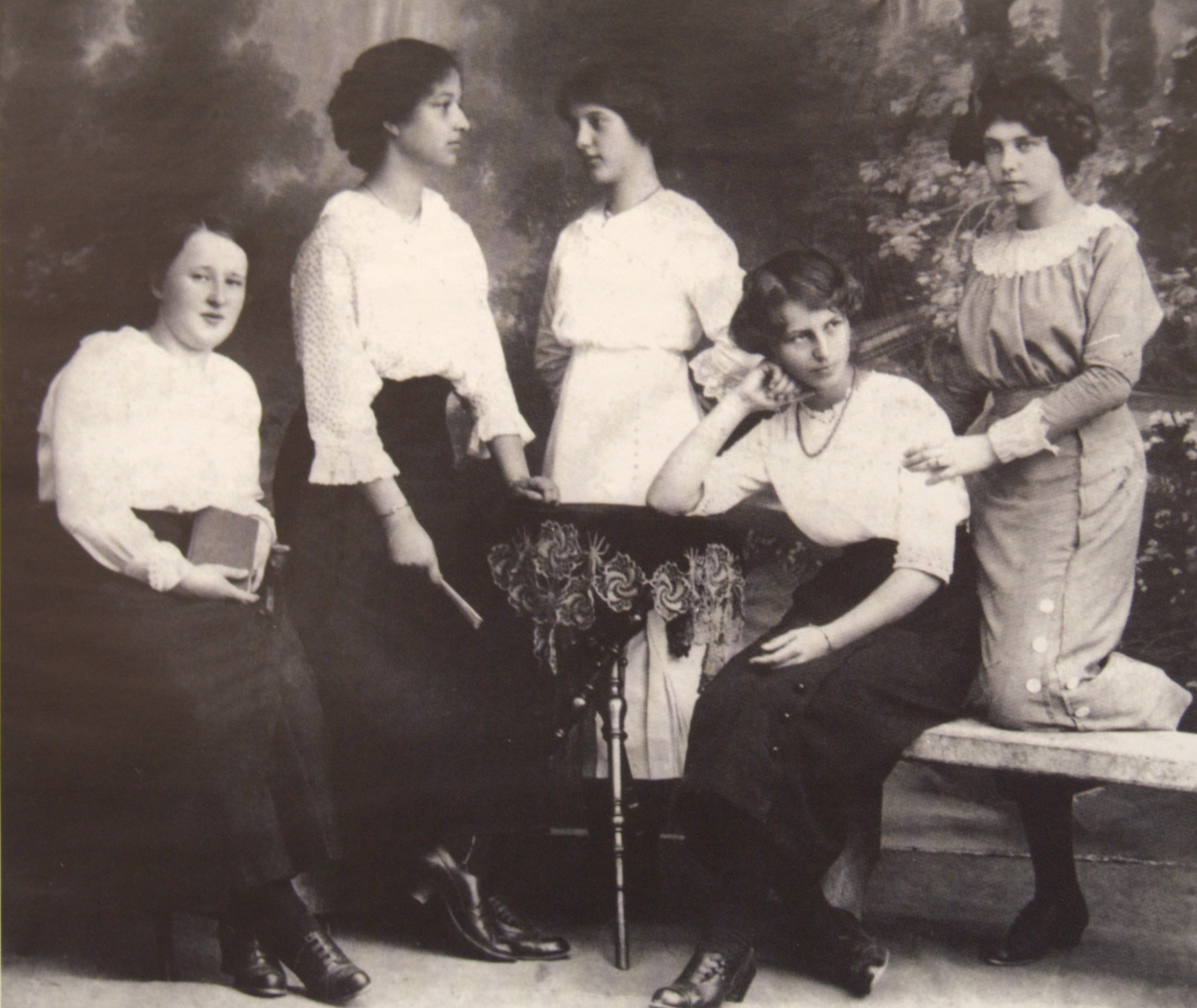 Novomeške gimnazijke med prvo svetovno vojno.